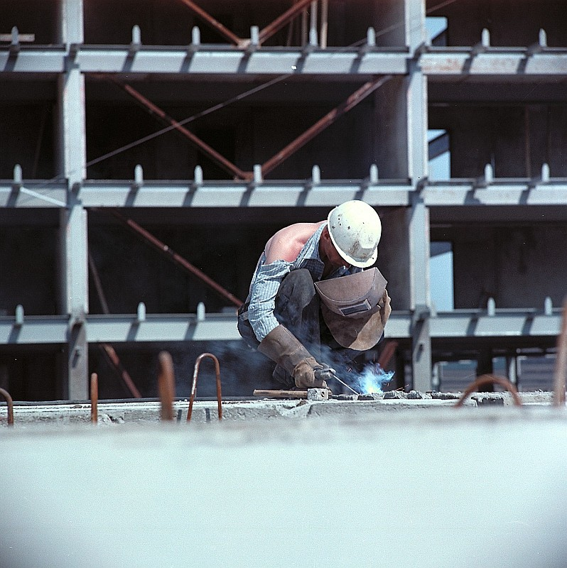 Original image description from the Deutsche Fotothek Schweißerschutzglas